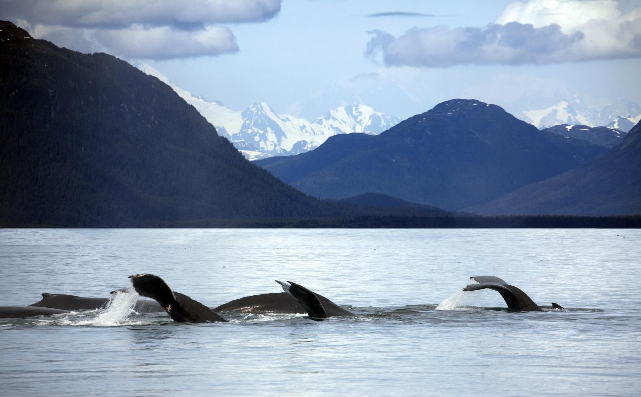 glacier bay